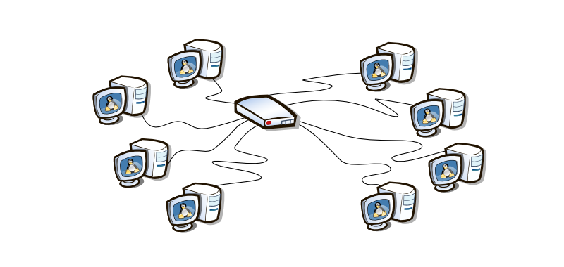 TIPOS DE REDES